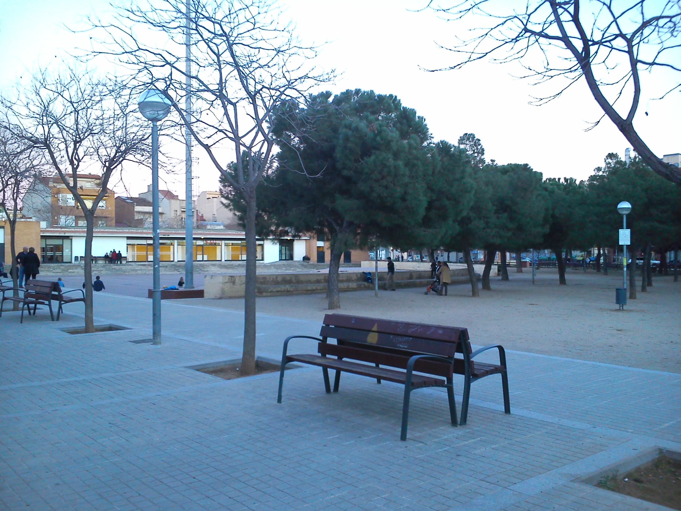 Imatge de la plaça del Treball a Sabadell del dia 5 de març del 2015